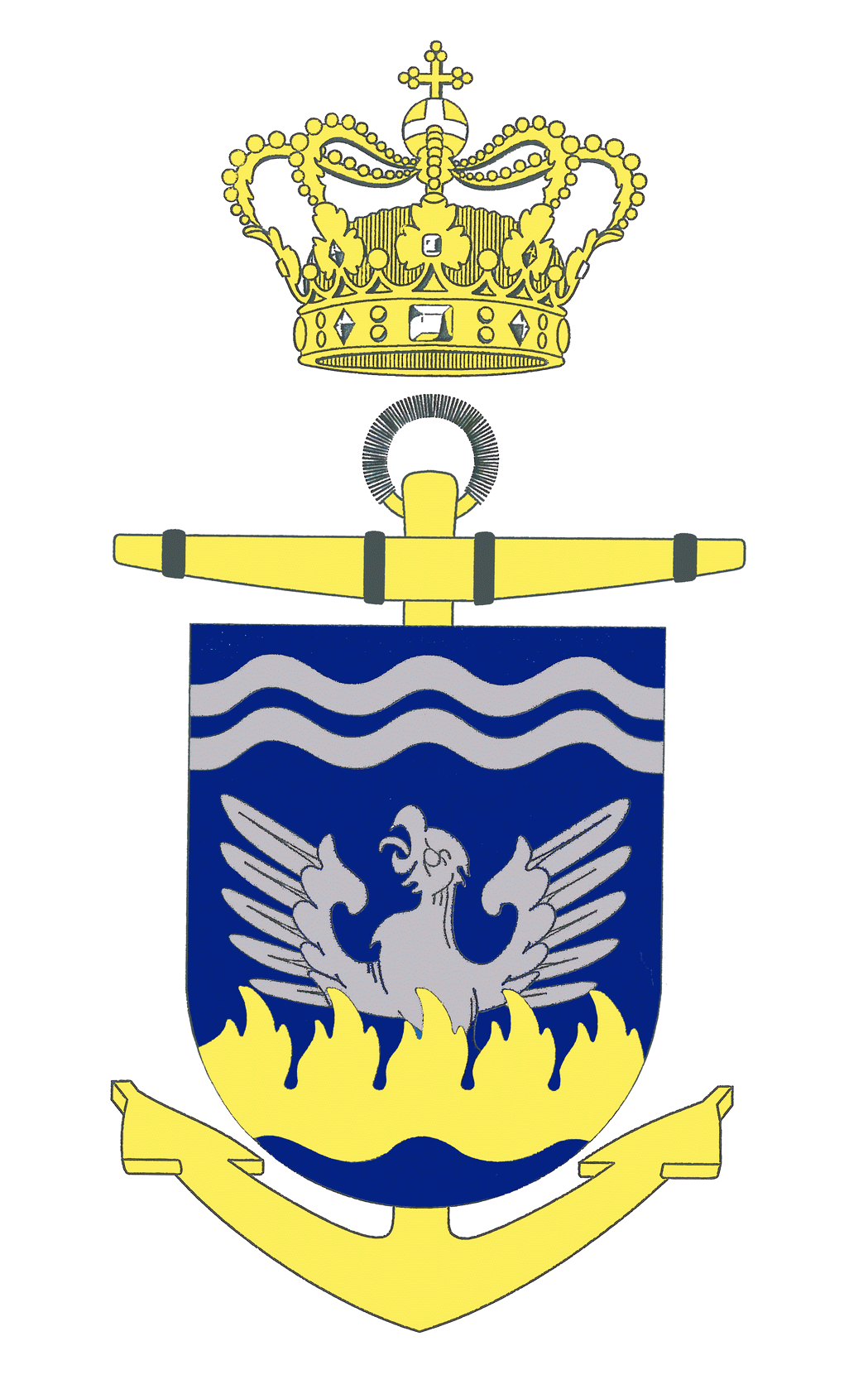 SIC Våbenskjold